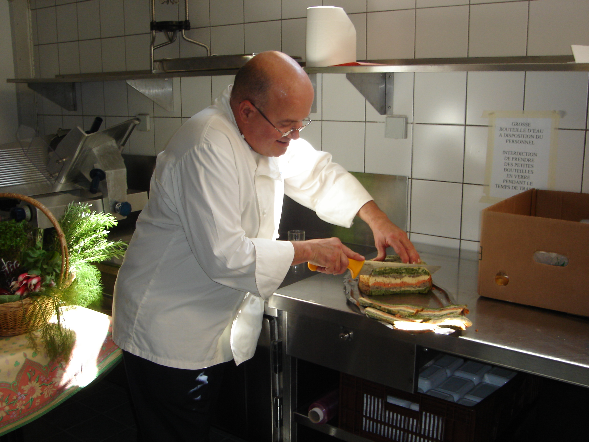 Crespeou, omelette provençale de différents couleurs superposées